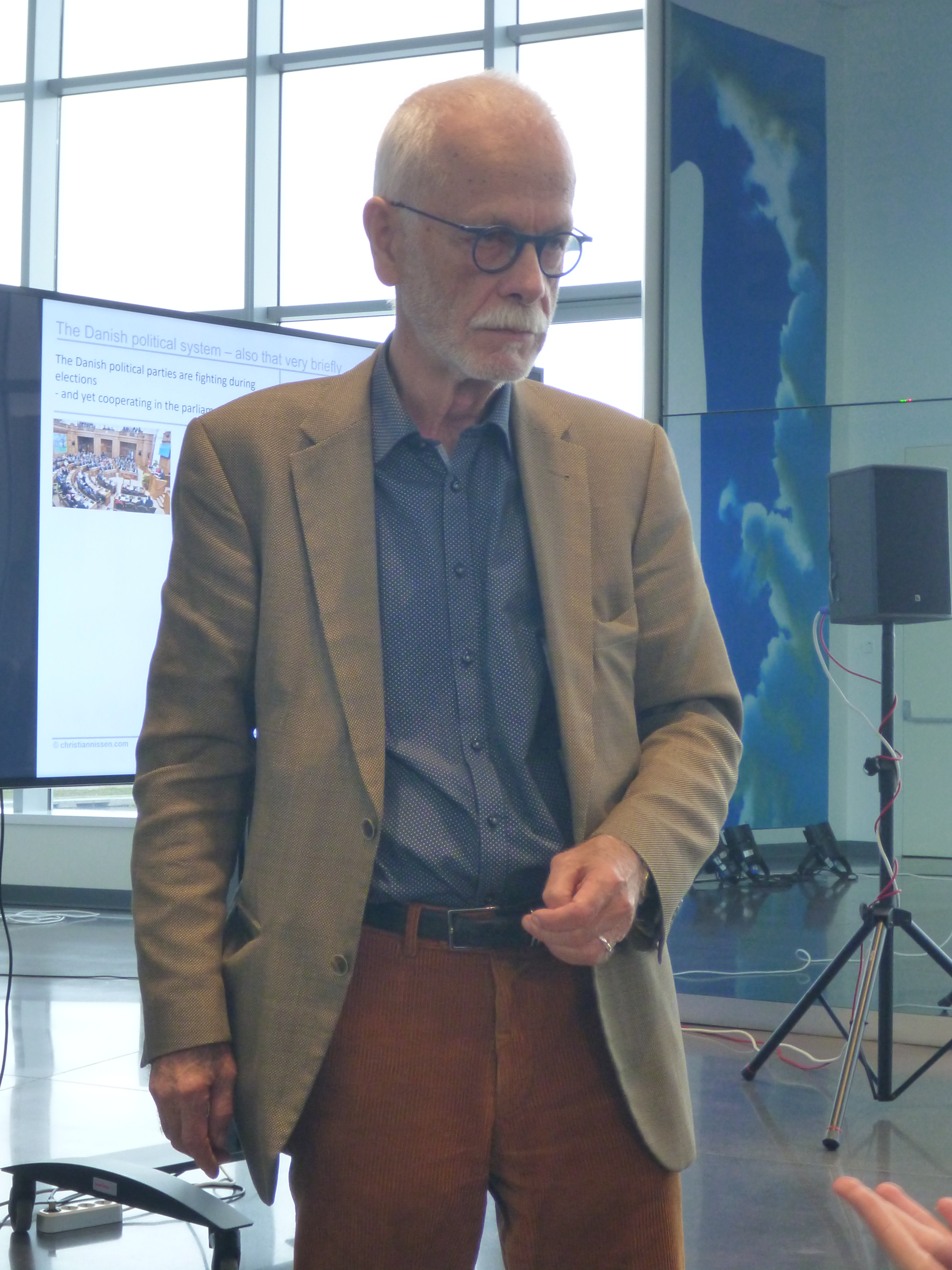 Кристиан Ниссен (Christian S. Nissen) в Ельцин-центре бывший директор Датского радио, 11 октября 2019 года